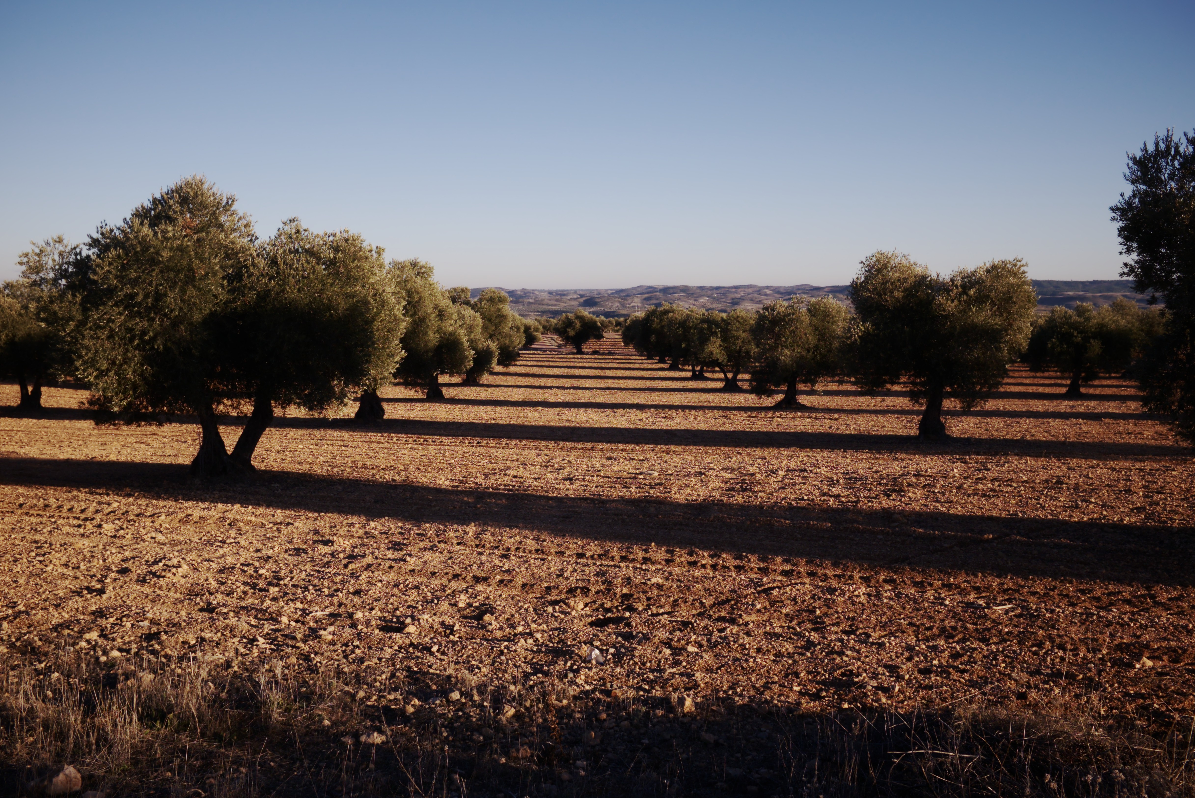 Arganda del Rey